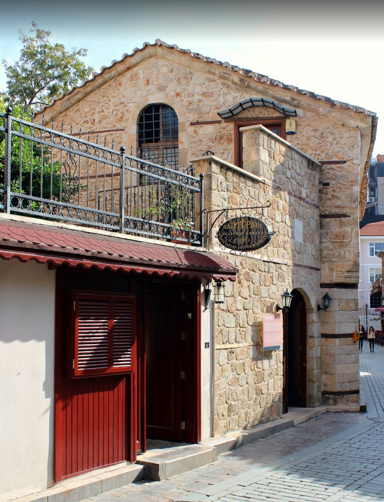 Храм в Анталии, где богослужения совершаются на церковно-славянском языке